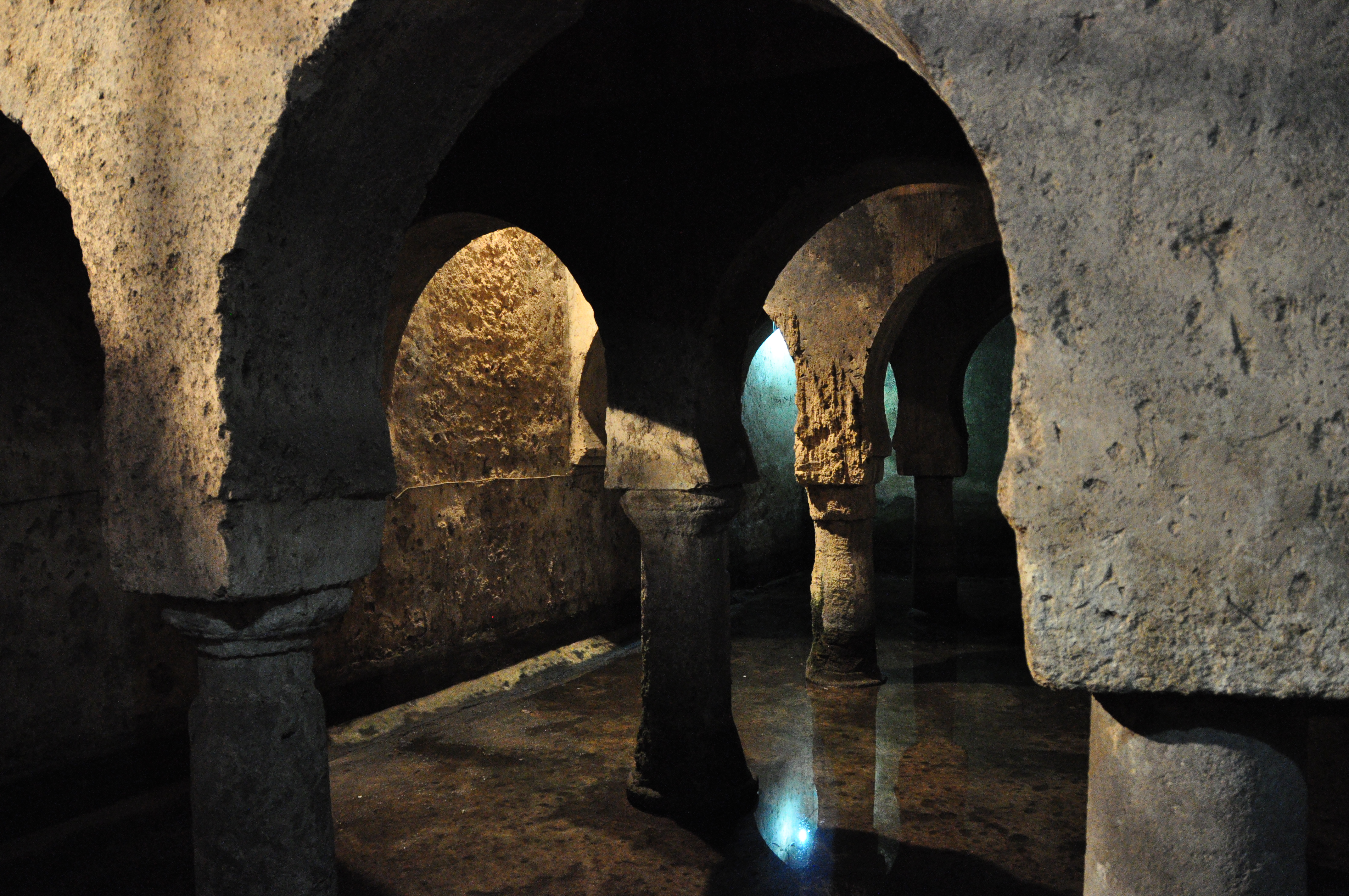 Aljibe almohade en el Palacio de las Veletas, sede del Museo Provincial de Cáceres.